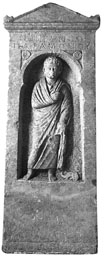 stèle du pêcheur découverte à Erétrie (Eubée) Archaeological Museum of Eretria Native nameΑρχαιολογικό Μουσείο ΕρέτριαςLocationEretria, GreeceCoordinates38° 23′ 46″ N, 23° 47′ 22″ E Established1960Website